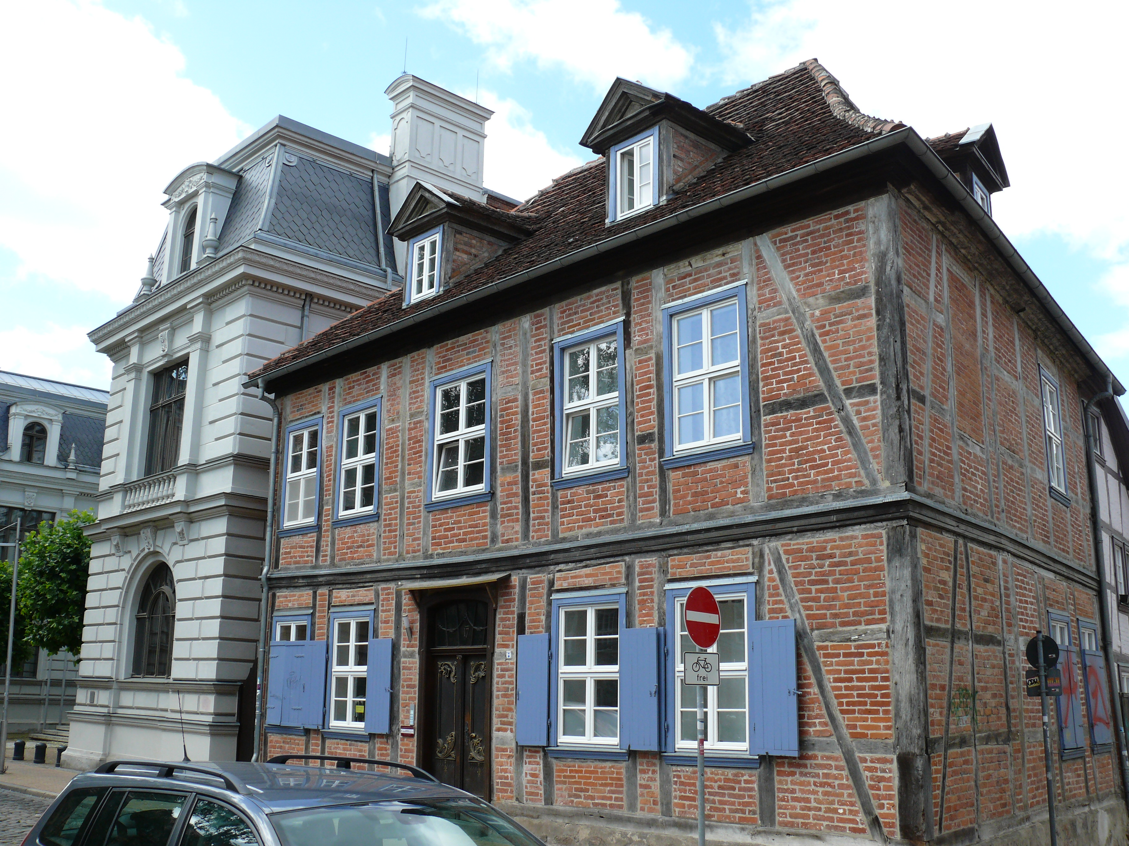 Das Gebäude "Puschkinstraße 17" in Schwerin.